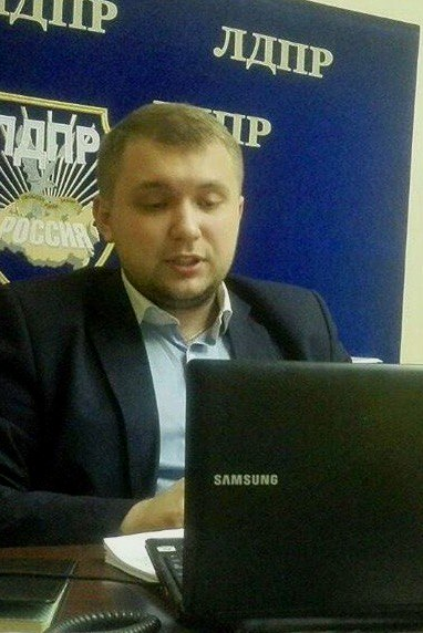 Депутат Государственной Думы VII созыва